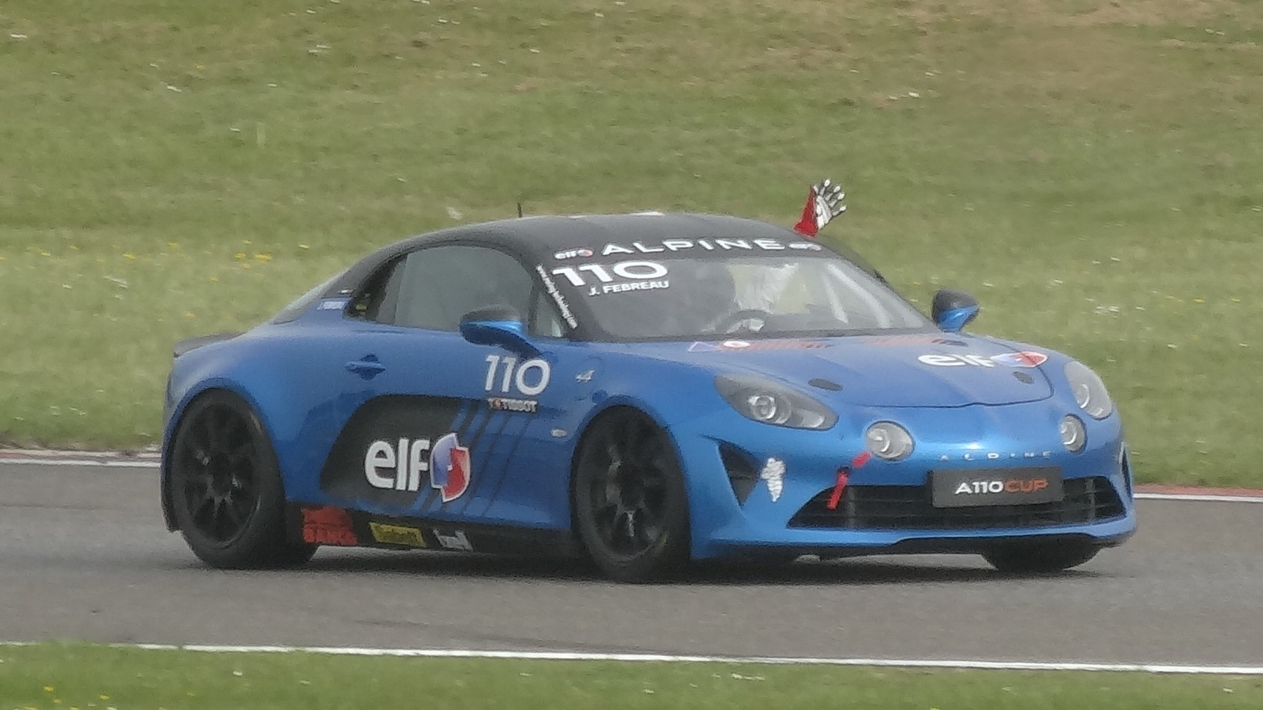 52e Coupes de Pâques (sport automobile), sur le Circuit Paul Armagnac à Nogaro (Gers) : Alpine Elf Europa Cup - Julien Fébreau durant son tour de décélération.